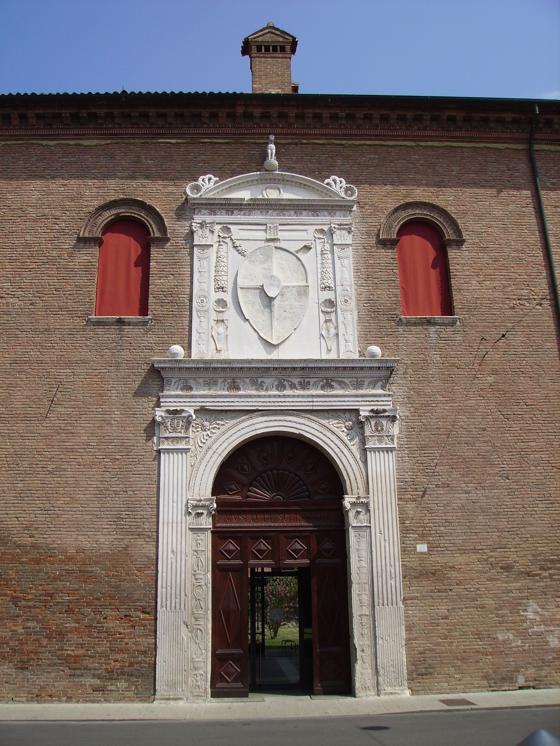 Palazzo Schifanoia This is a photo of a monument which is part of cultural heritage of Italy.